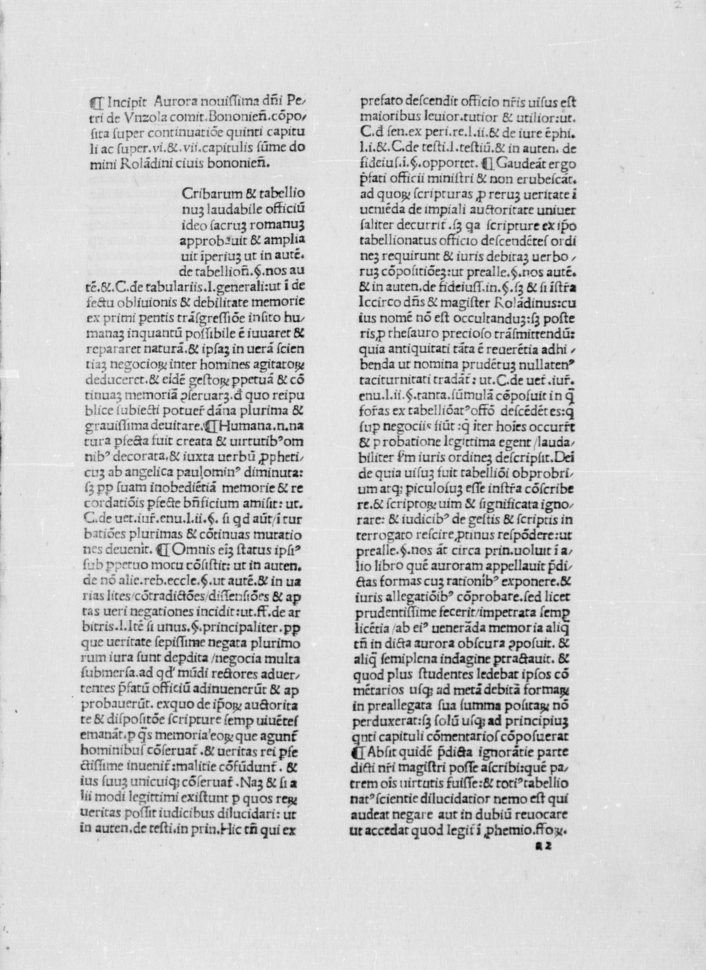 carta a2r